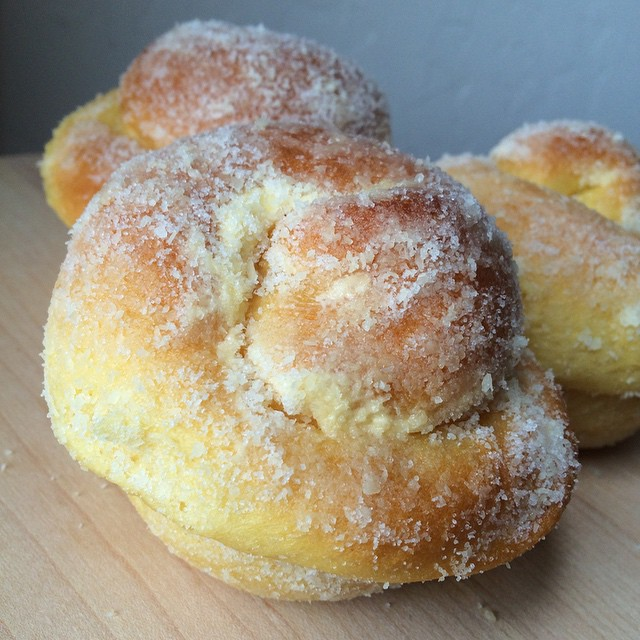 Ensaymada from #ValeriosBakery